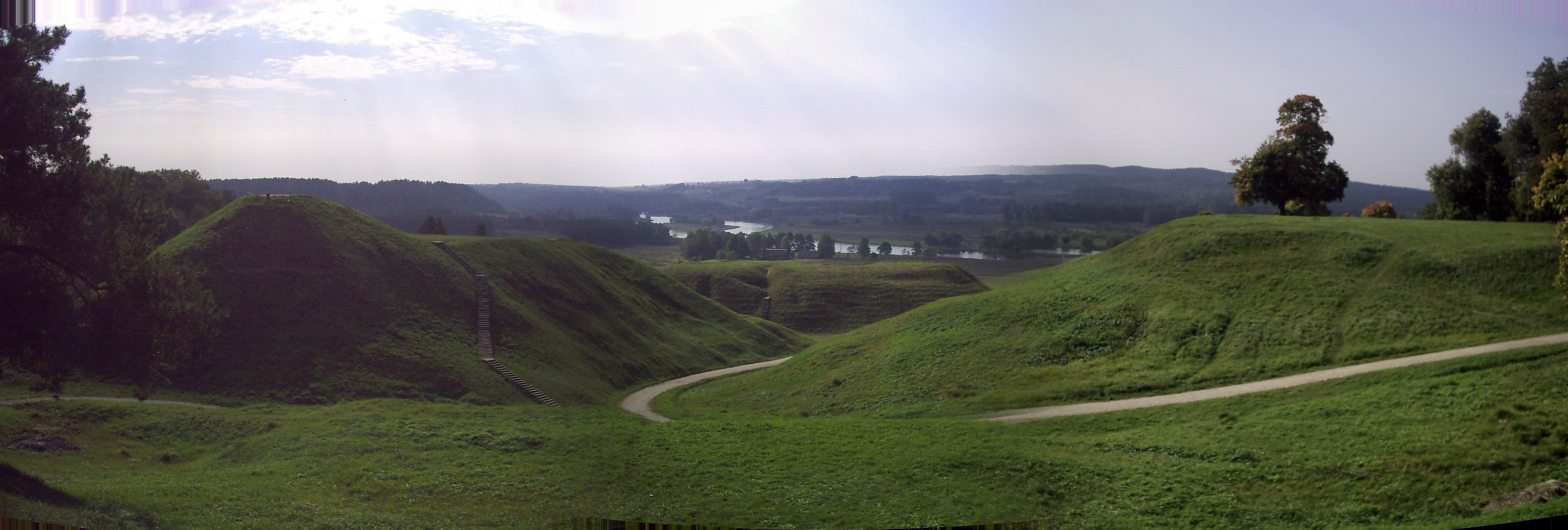 Komentaras Foto: Tomaš Staševskij